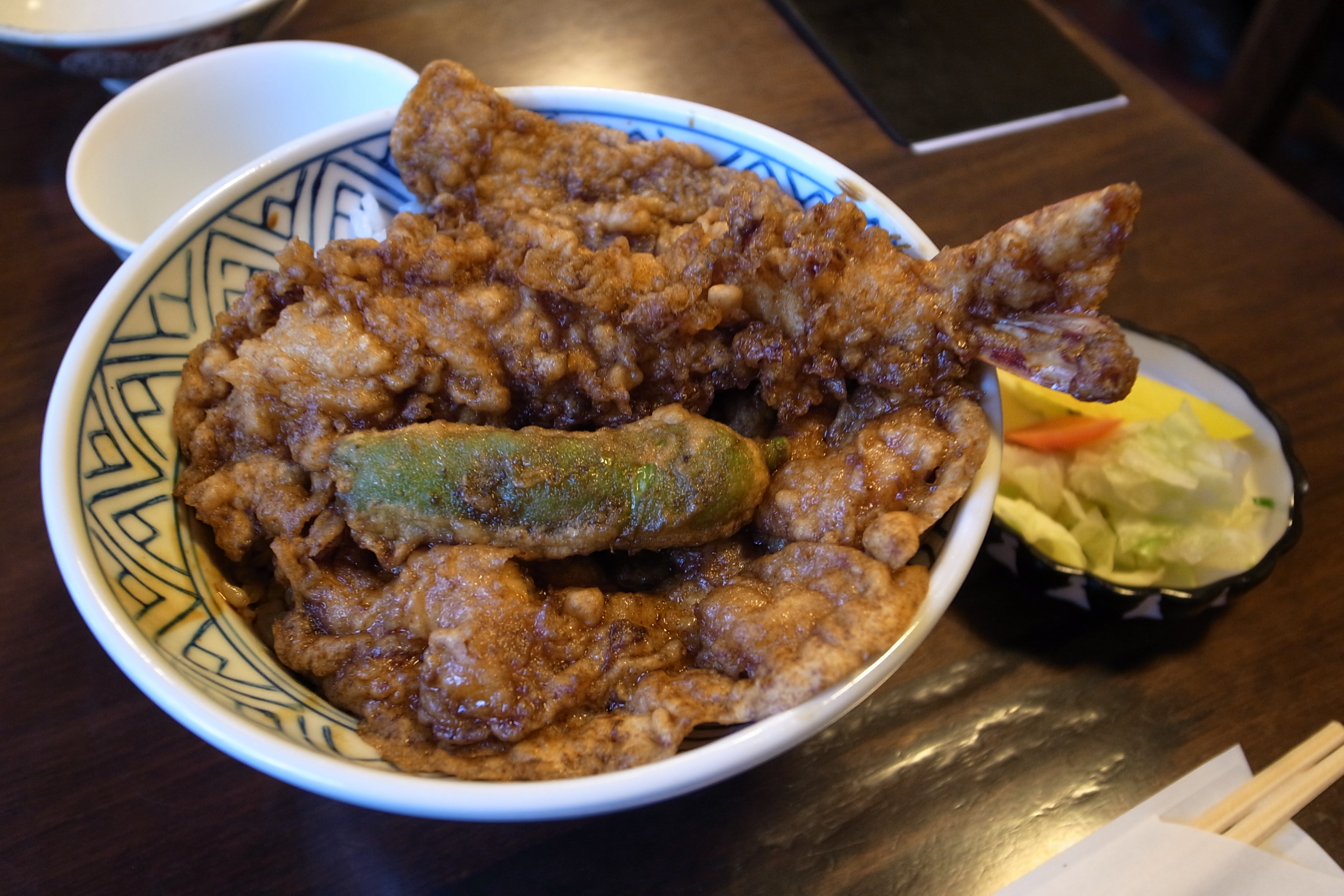 Tendon (Tempura over rice) @Daikoku-Ya, Asakusa, Tokyo